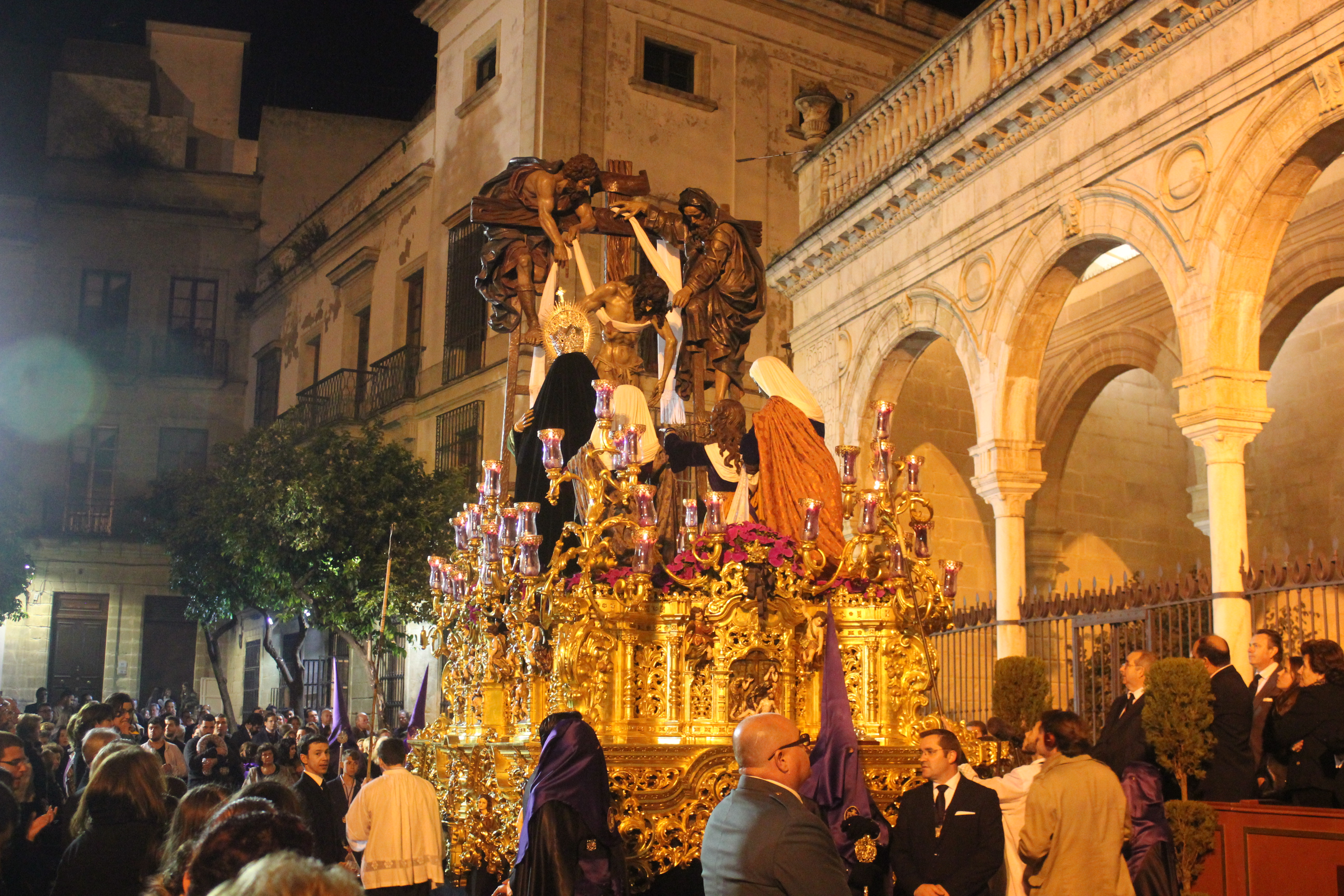 Hermandad de la Soledad procesionando en la Semana Santa de Jerez de la Frontera 2016 (Andalucía, España) This is a photography of a Folklore festival in Spain (Wikidata id Q6124533).